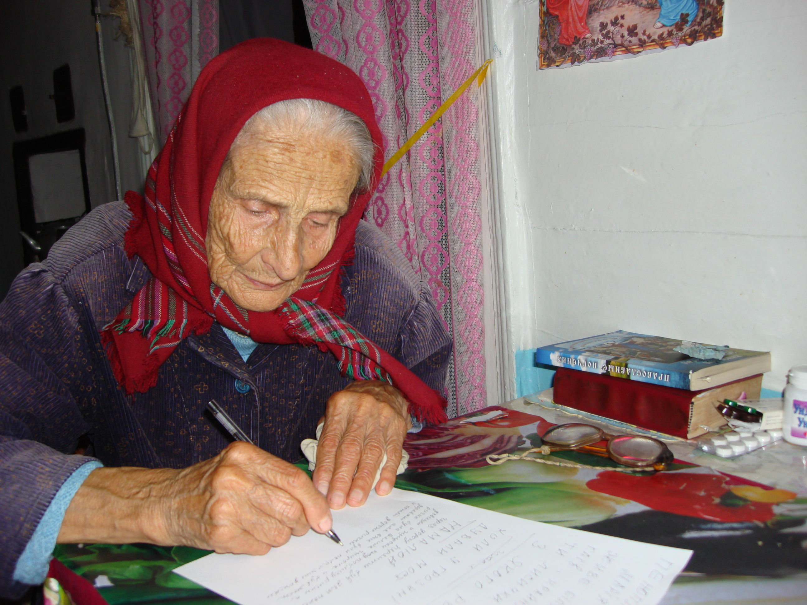 с.Сингаї Коростенського району, найстаріша мешканка села Камінська Надія Яківна (12.10.1924р.н.) за спогадами минулого села